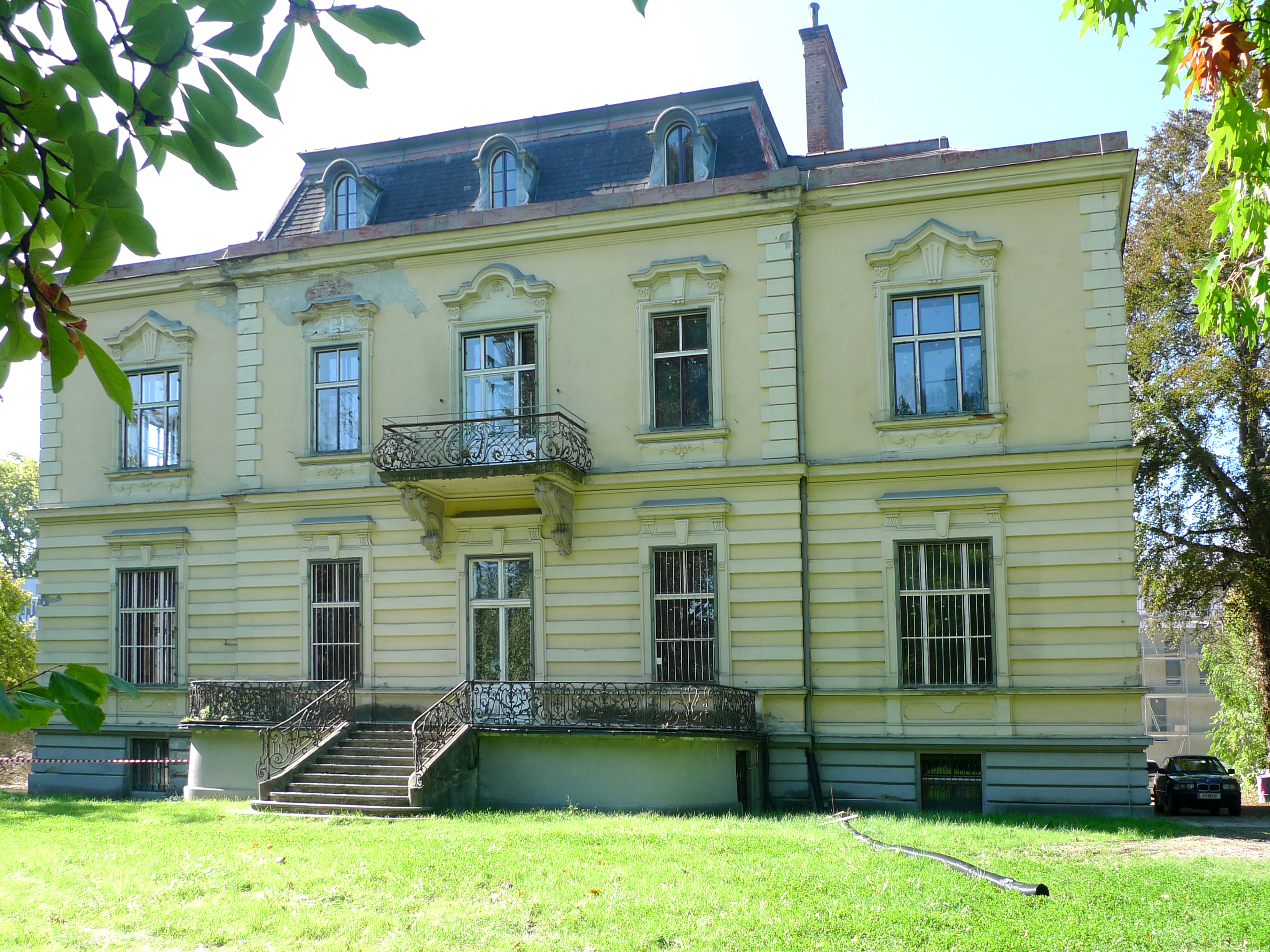 Villenanlage Hartenau